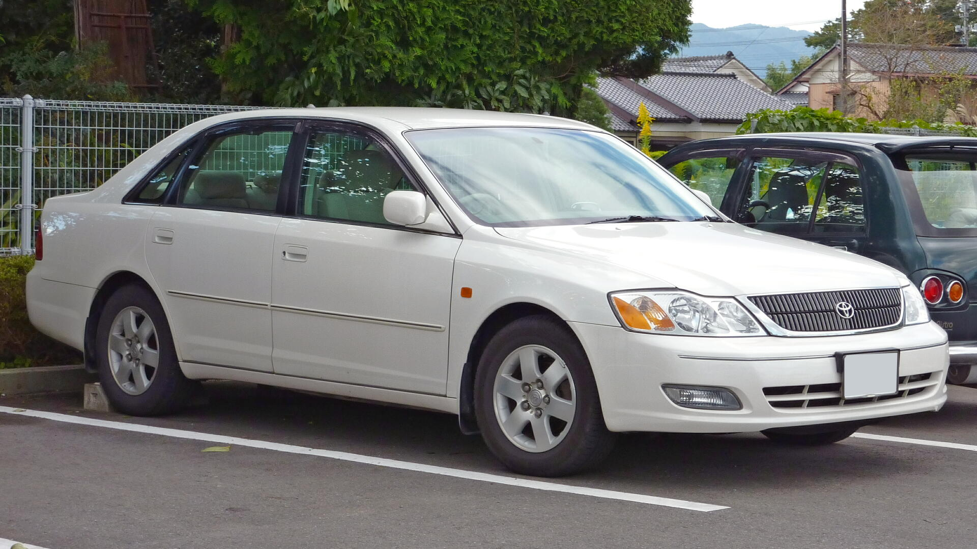 トヨタ・プロナード